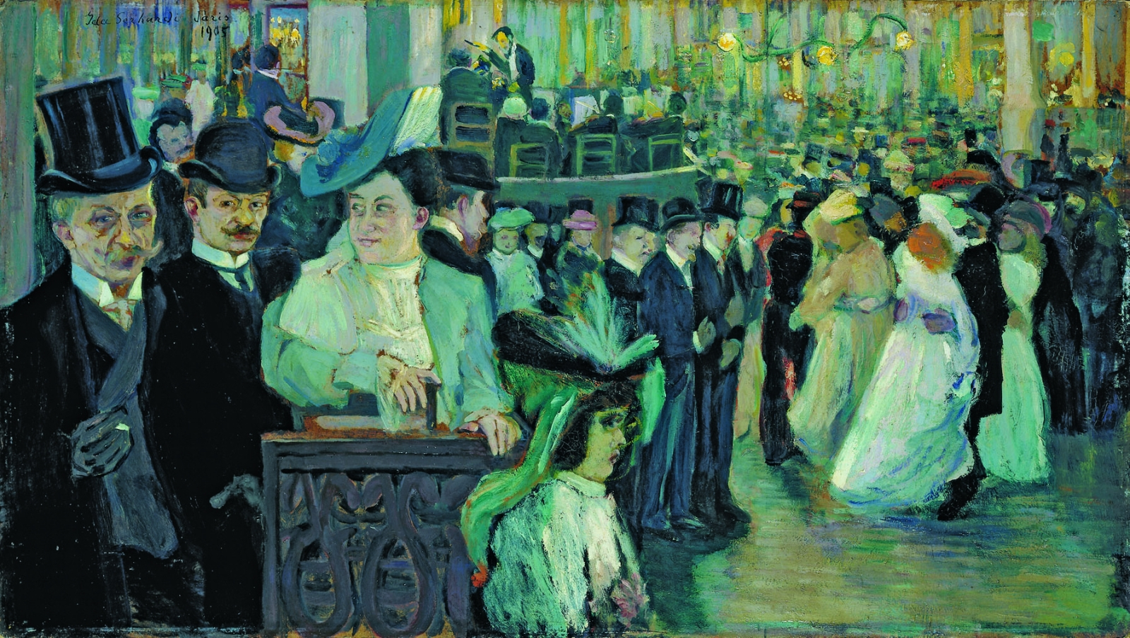 Großes Pariser Tanzstück